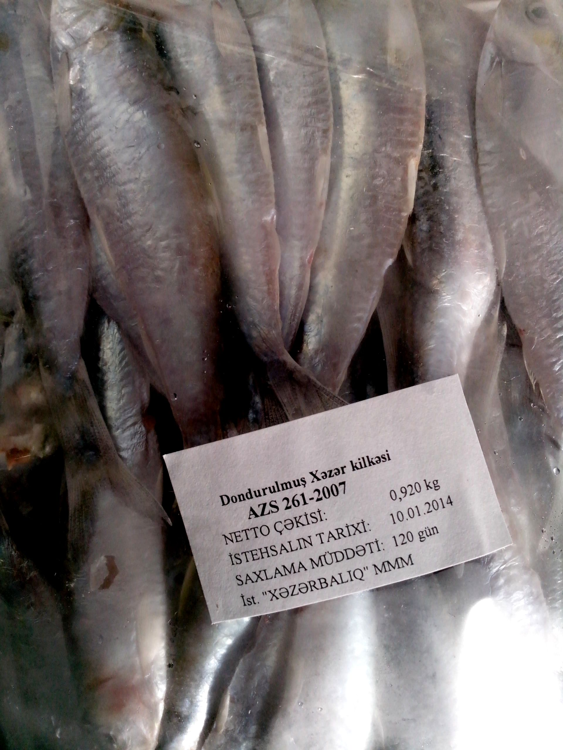 Dondurulmuş Xəzər kilkəsi